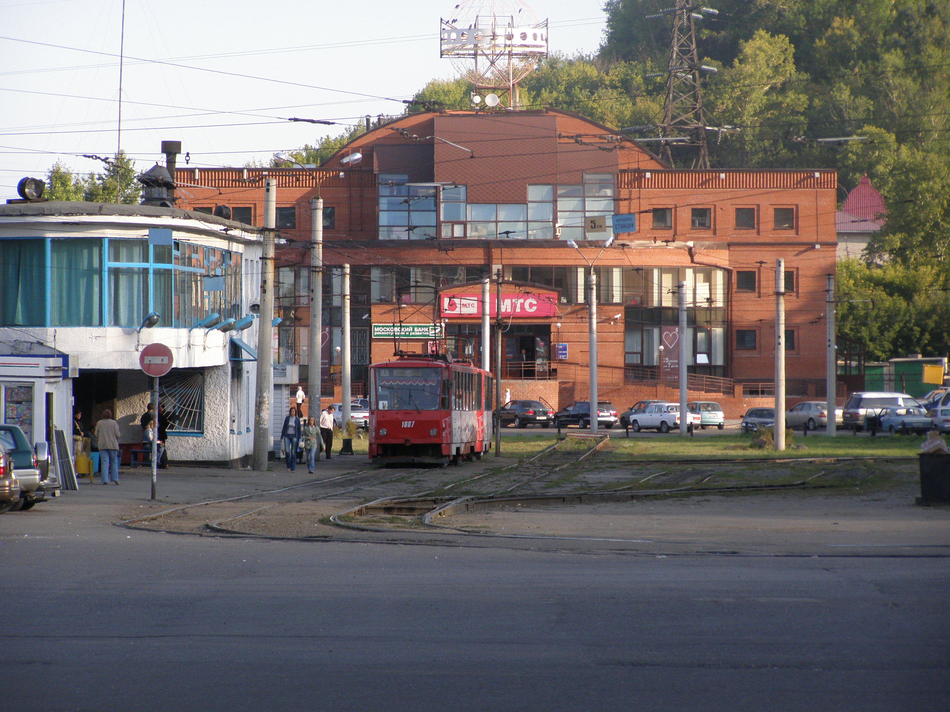 Площадь Свободы (Барнаул). Трамвайное депо. МТС